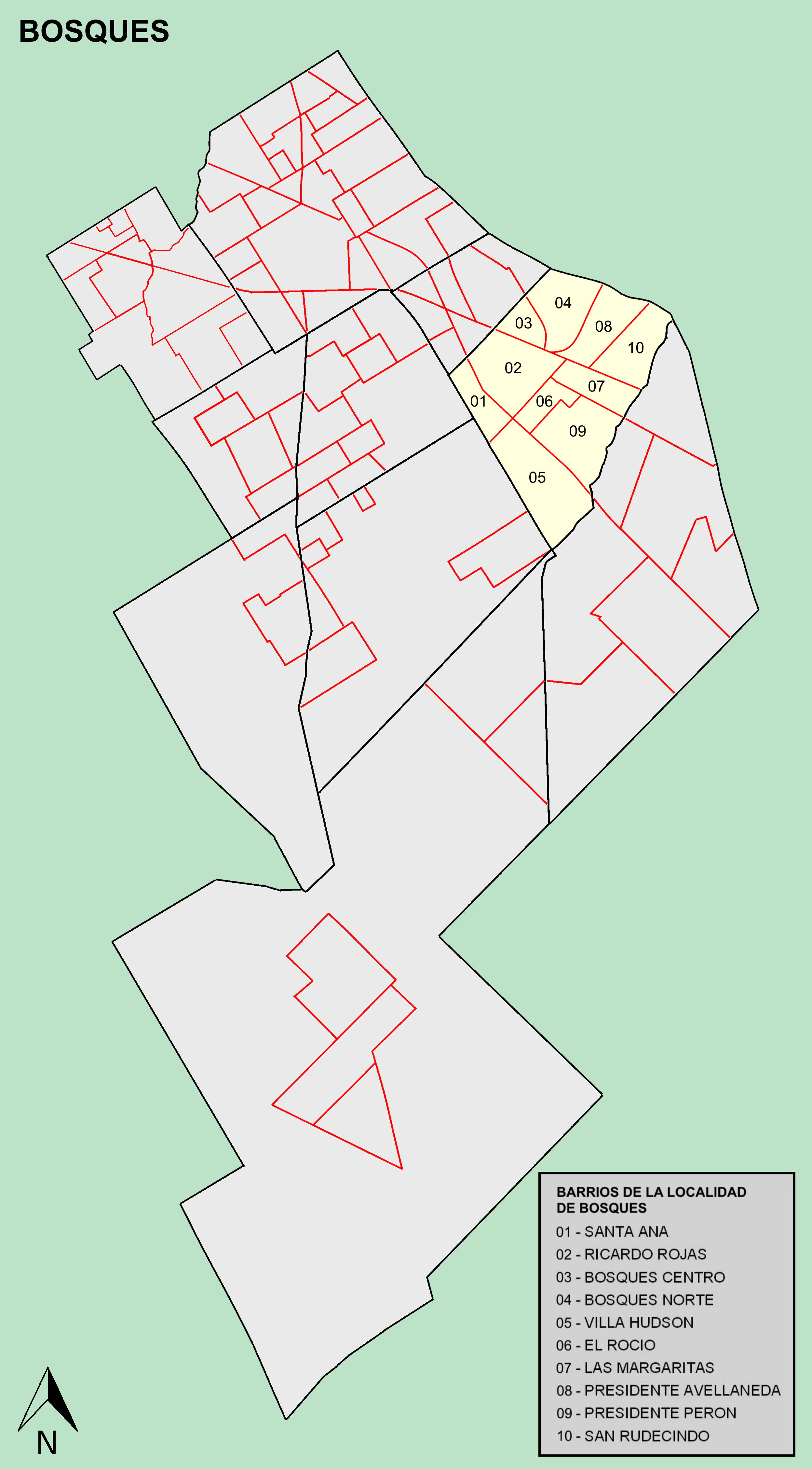 Mapa barrios de Bosques